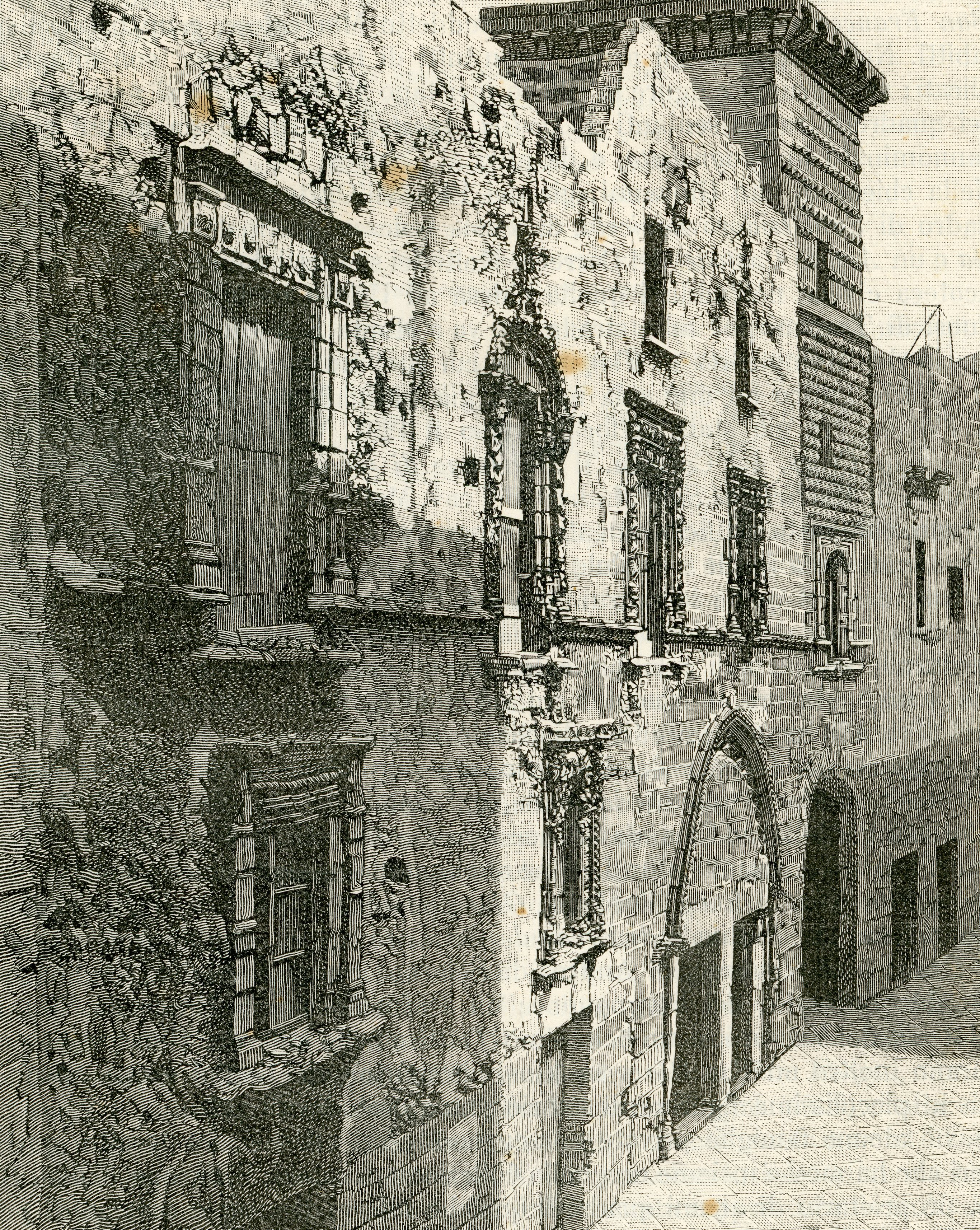 Trapani: casa gotica in via Giudecca (xilografia di Barberis 1892).